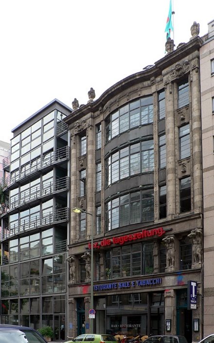 Sitz der tageszeitung in der Rudi-Dutschke-Straße (ehemals: Kochstraße) im Berliner Stadtteil Kreuzberg.